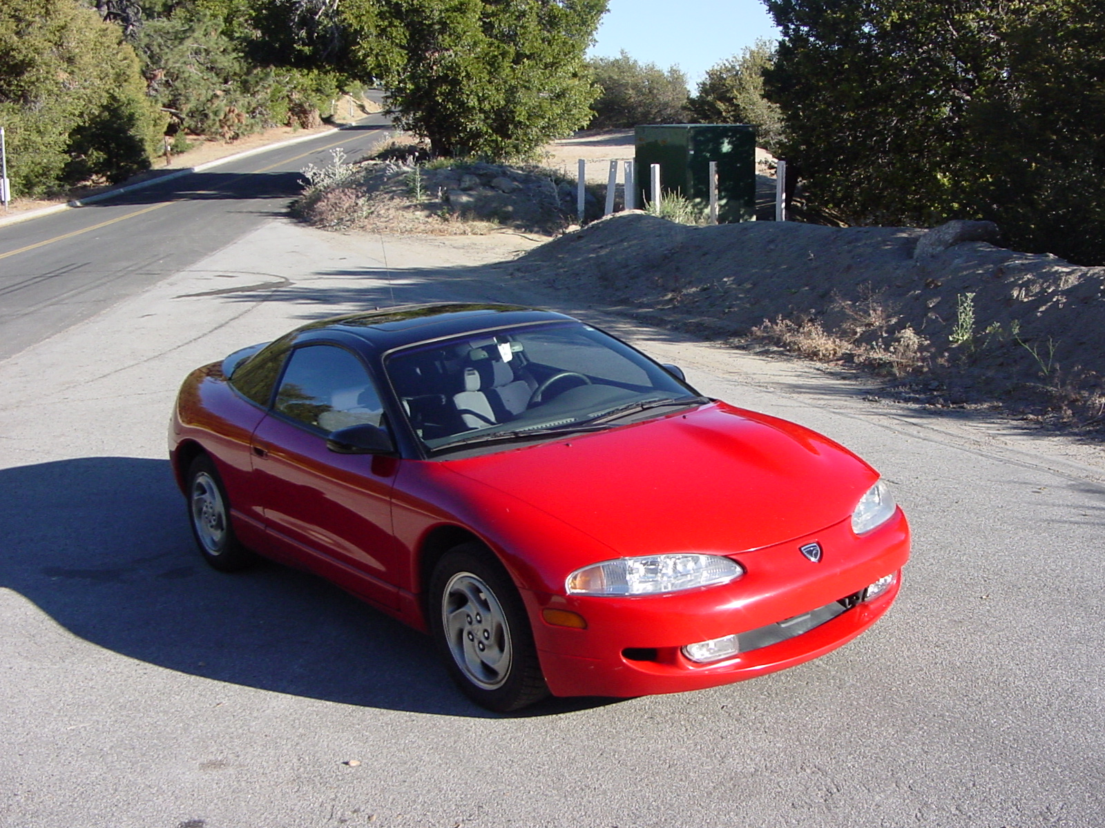 1995 Eagle Talon TSi 2G